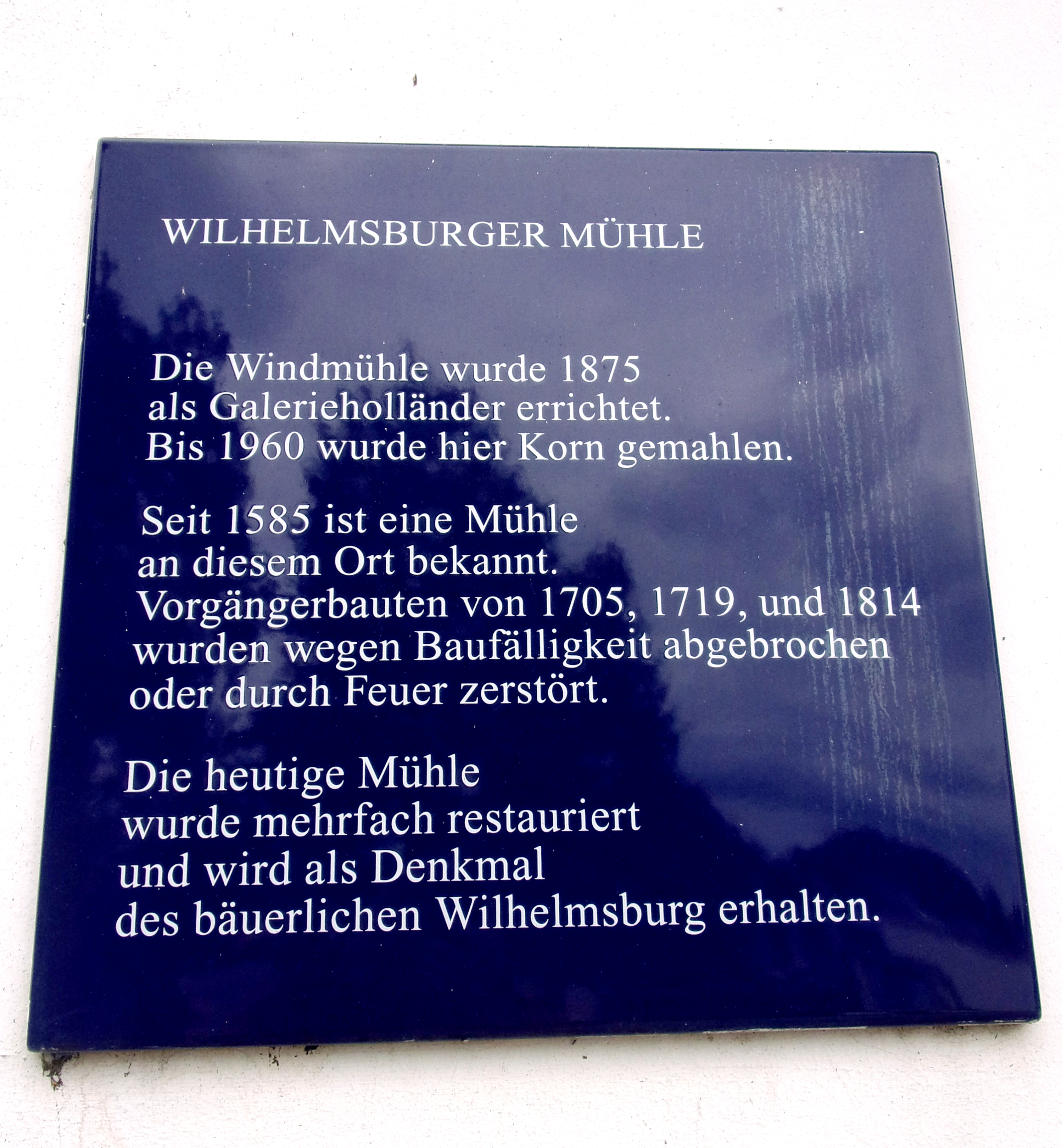 Die Windmühle Johanna an der Schönenfelder Straße 99a gilt als Wahrzeichen von Wilhelmsburg. Der Galerieholländer mit Jalousieflügeln und Windrose wurde 1875 wieder aufgebaut, die Vorgängermühle brannte aus. Auftraggeber war der Wilhelmsburger Müller Christoph Cordes, Baumeister war F. Dobbertin aus Boizenburg. Zum Ensemble gehört u. a. die Mühle, das Müllerhaus, ein neu gebautes Backhaus, das Mühlencafe´, und das Museum sowie diverse Veranstaltungen. Die Mühle nimmt regelmäßig am Deutschen Mühlentag teil. Tafel des Hamburger Tafelprogramms. Mehr Infos unter dem folgendem Link: This is a photograph of an architectural monument.